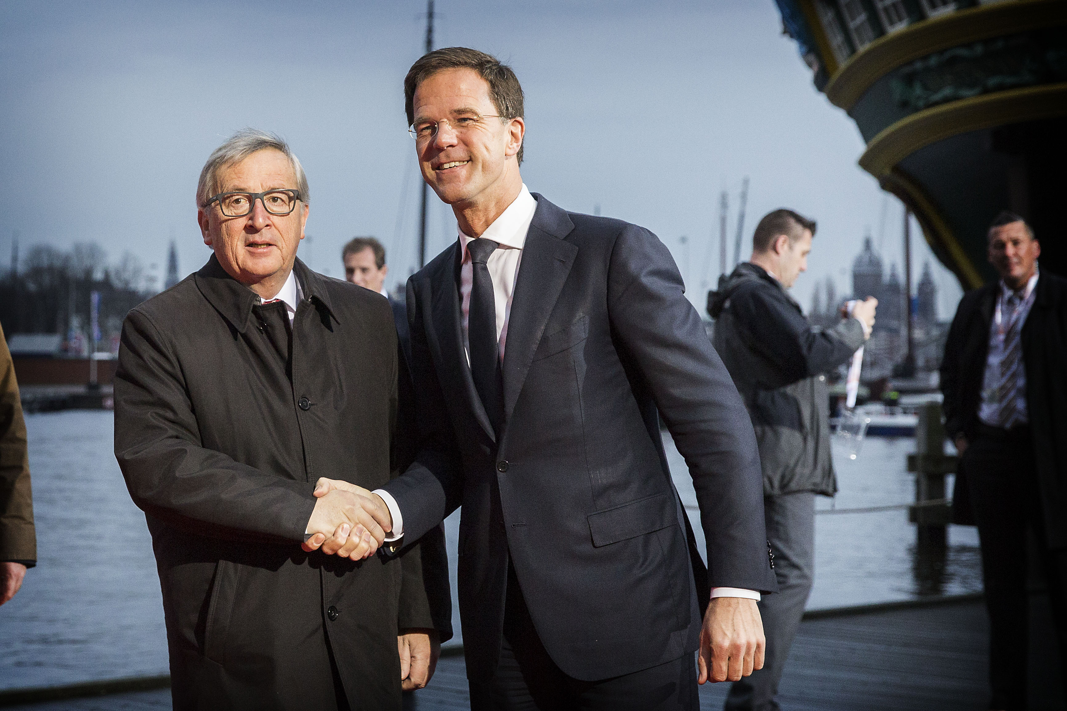 Amsterdam, 7 januari 2016 / Amsterdam, January 7th 2016. Aankomst per boot van de Europese Commissie bij het Scheepvaartmuseum in Amsterdam. EU Commission arrives at Scheepvaartmuseum in Amsterdam. Foto: Rijksoverheid/Valerie Kuypers – Photograph: Dutch Government/Valerie Kuypers